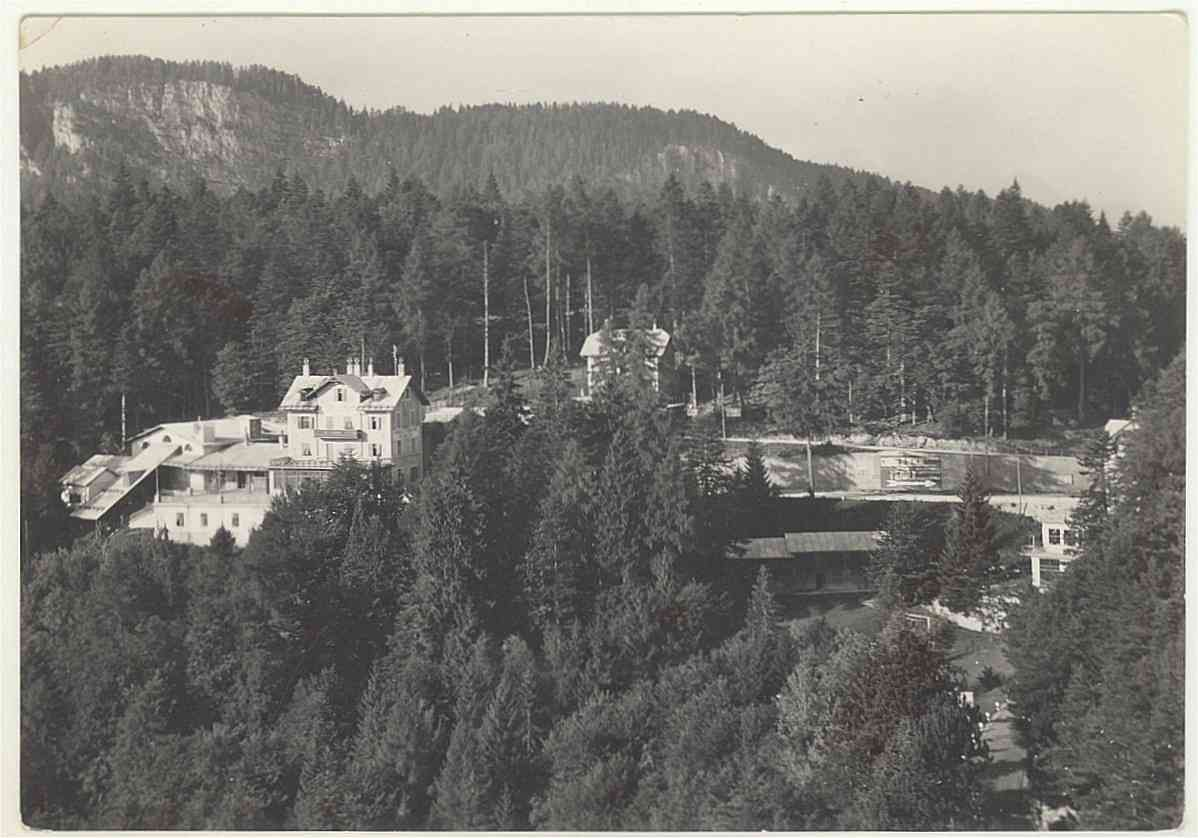 BZ Passo della Mendola m.1375 - panorama